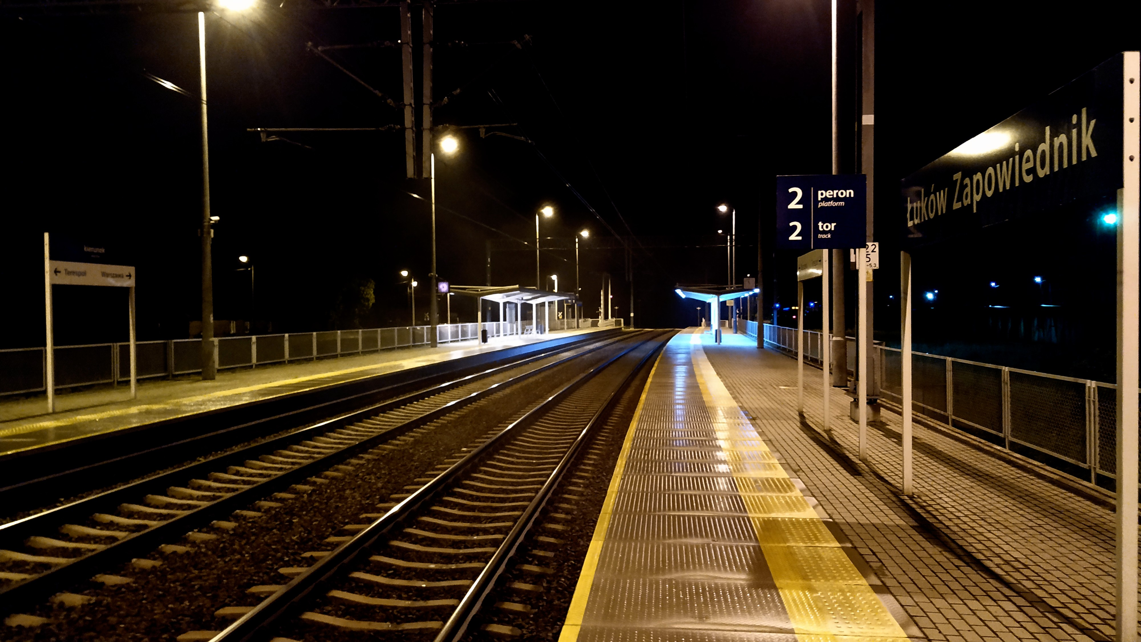 Przystanek Łuków Zapowiednik w nocy